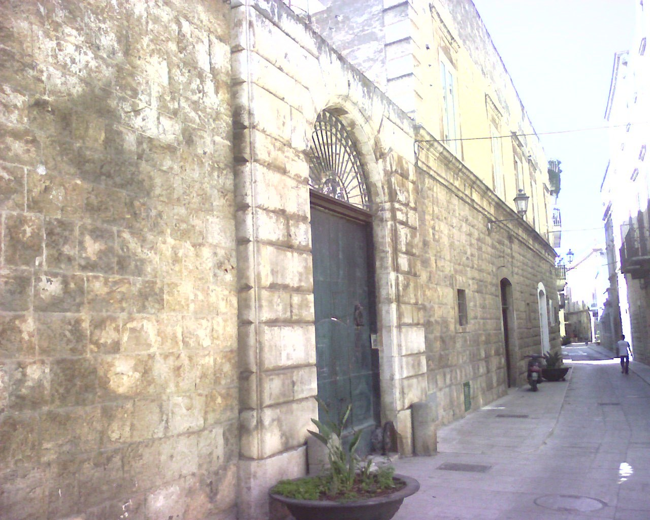 palazzo capitaneo- Modugno (bari)-Italy